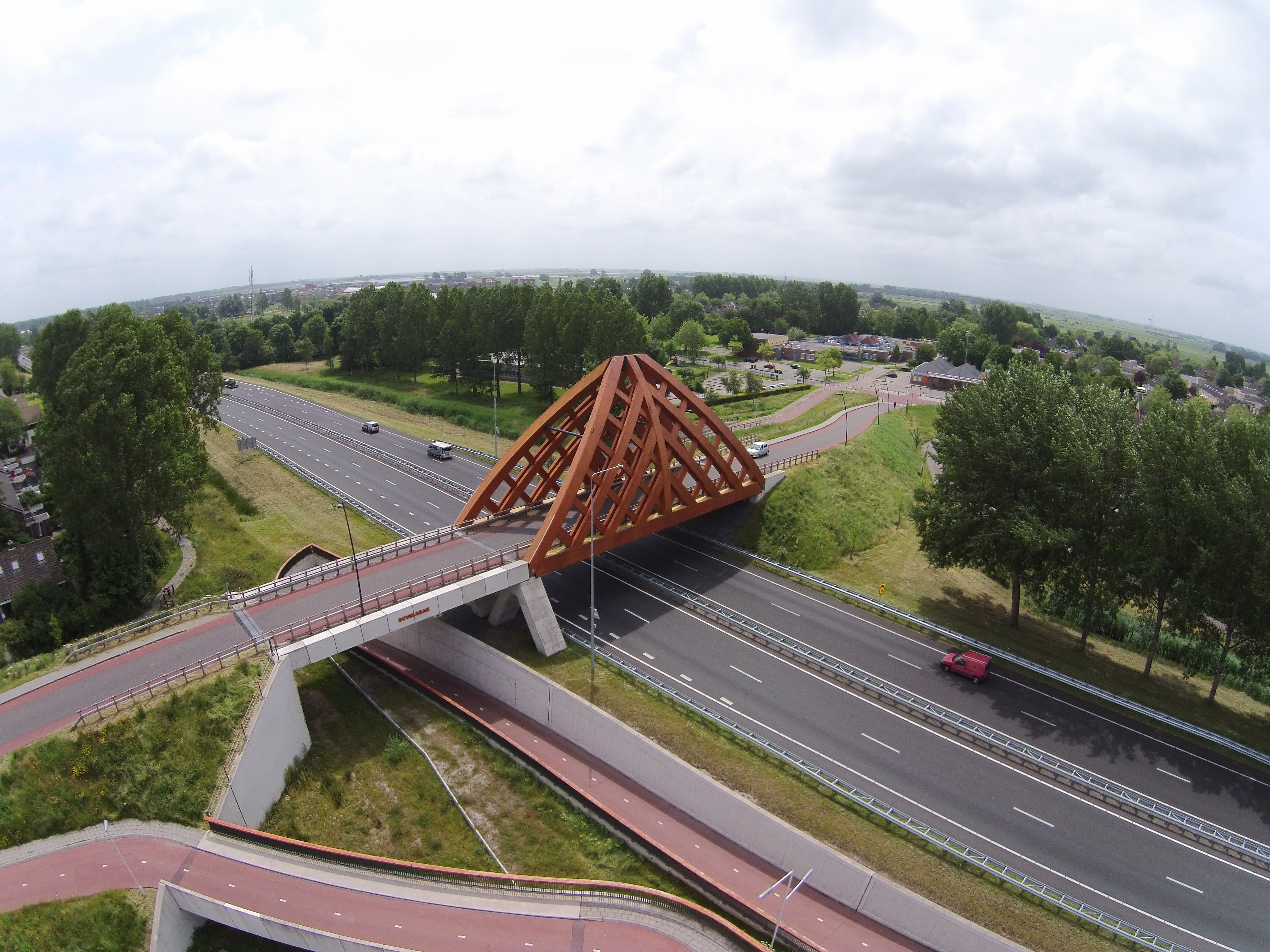 Viaduct Dúvelsrak van hout en staal over de A7 in Sneek